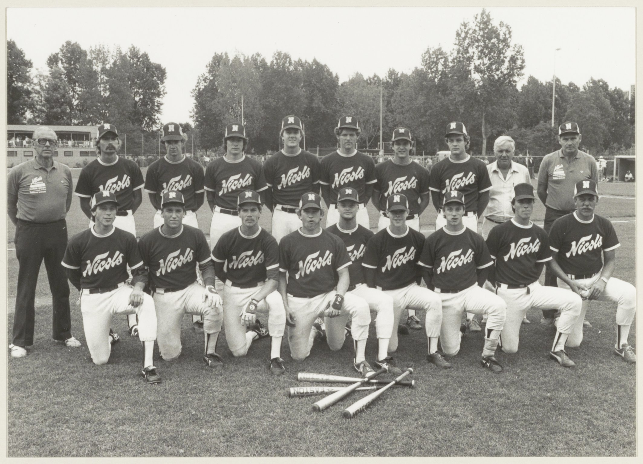 CollectieCollectie Fotoburo de BoerInventarisnummerNL-HlmNHA_54013204NL-HlmNHA_1478_22124kBeschrijvingDe kampioensploeg van Haarlem Nicols, kampioen van Nederland. Staand v.l.n.r.: Co Leurs, Hennie Jenken, Bill Groot, Marcel Joost, Leo van Schreven, Frans de Bruin, Skip Clark, Pim Winkel, Nico Boon en Frans van de Berg. Voorste rij v.l.n.r.: Thijs Vervaat, Gerlach Halderman, Frank Koot, Marc Morrison, Haitze de Vries, Bart van der Bosch, Frank Bos, Rob Klaver en Jan Dick Leurs.FotonummerNL-HlmNHA_1478_5726DocumenttypePortrettenSoort vervaardigerFotograaf AnnotatiesC3-11HD.260782PersonenLeurs, CoJenken, HennieGroot, BillJoost, MarcelSchreven, Leo vanBruin, Frans deClark, SkipWinkel, PimBoon, NicoBerg, Frans van deVervaat, ThijsHalderman, GerlachKoot, FrankMorrison, MarcVries, Haitze deBosch, Bart van derBos, FrankKlaver, RobLeurs, Jan Dick LandNederland ProvincieNoord-Holland GemeenteHaarlem PlaatsHaarlem StraatJaap Edenlaan GeografischOverdelft, Pim Muliersportpark Begindatum07-1982Einddatum07-1982TechniekFoto TrefwoordenSport en recreatie, honkbal